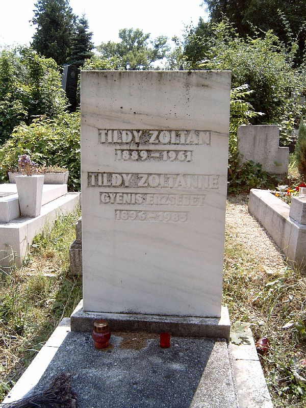 Tildy Zoltán sírja Budapesten. Farkasréti temető: 49/7-2-6.